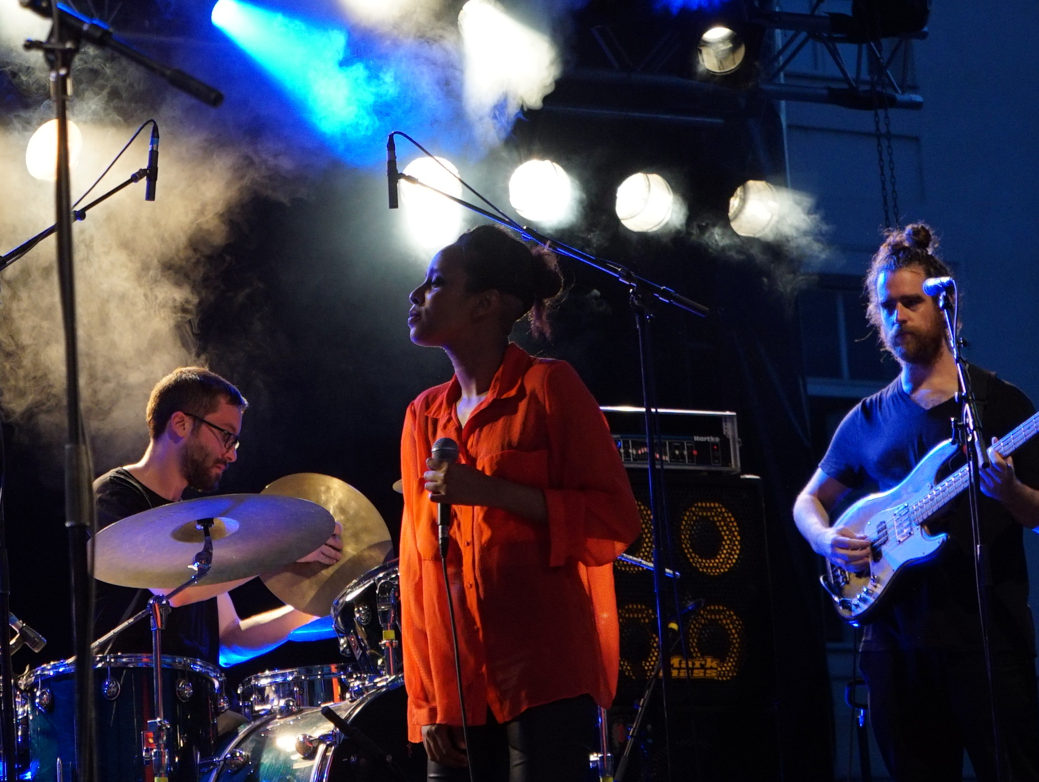 Ester Rada lors du festival "Musiques d'Ici et d'Ailleurs" de 2015.